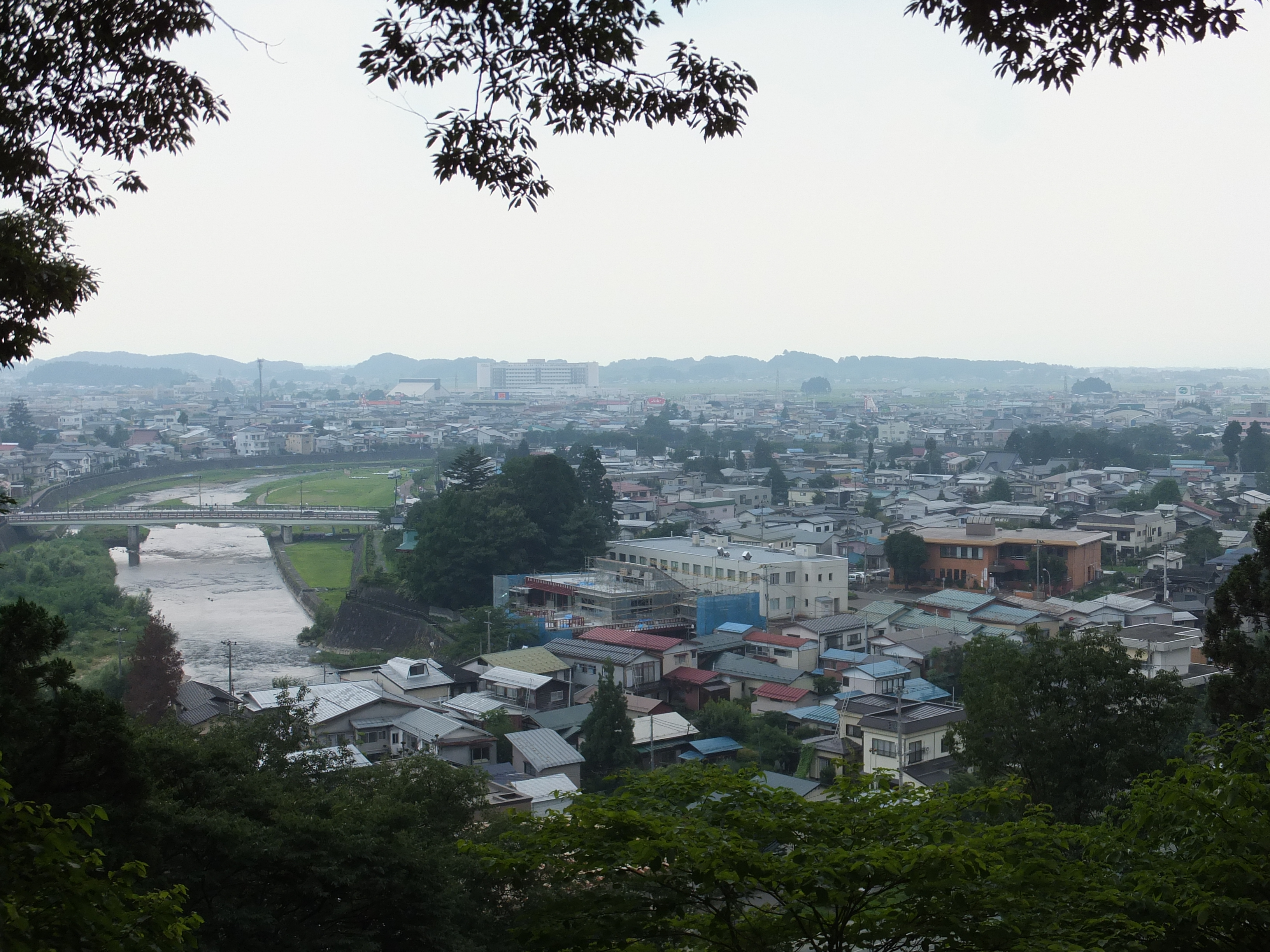 横手城から見た眺め